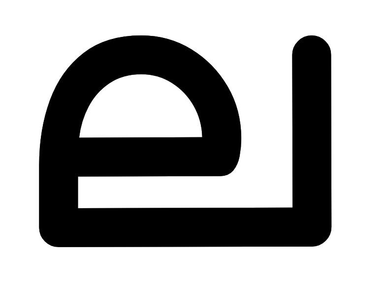 ല മലയാളം അക്ഷരം